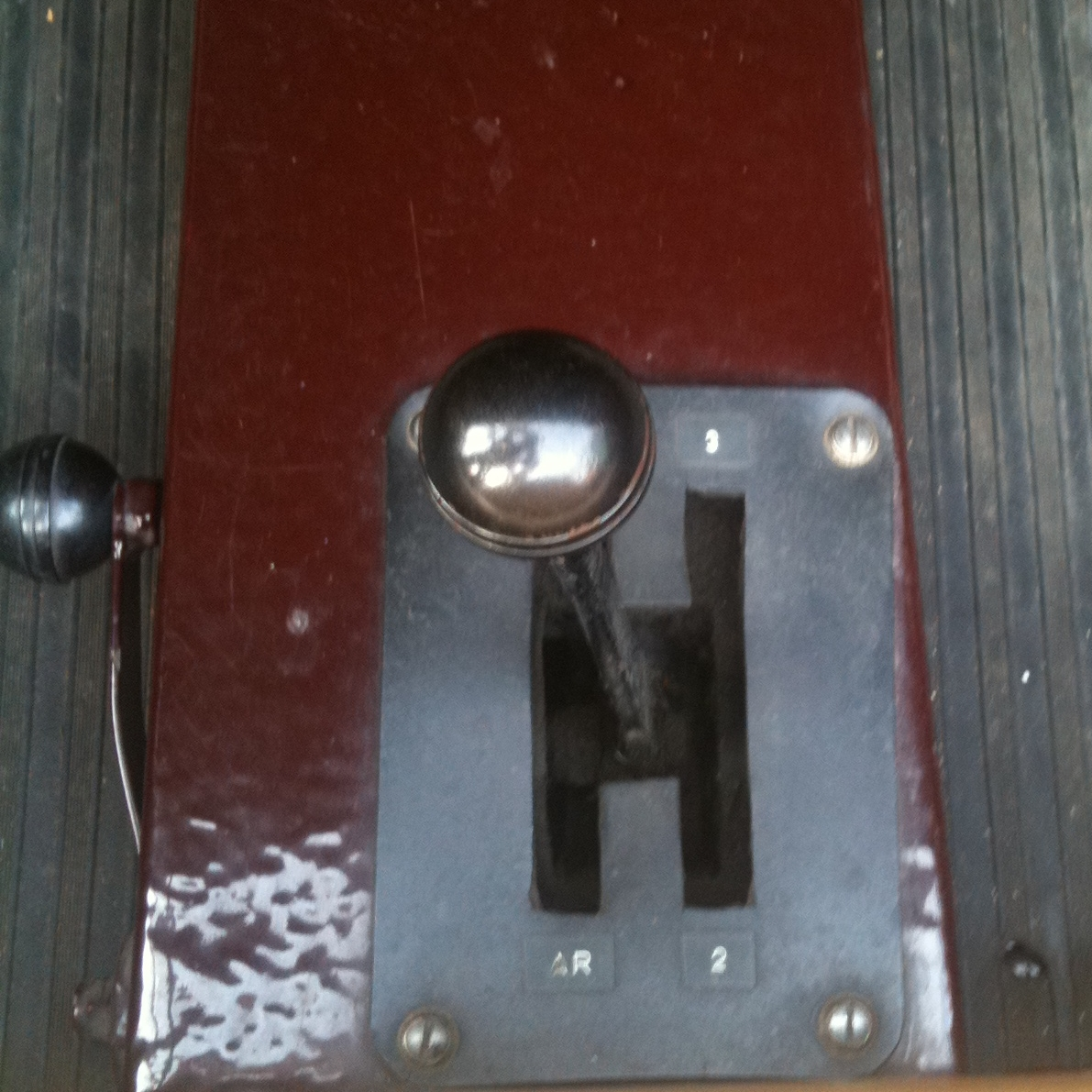 Rovin Type 2 produite en 1949 à Saint-Denis dans l'usine Delaunay-Belleville photographiée à Trilport (Seine-et-Marne, France). Détail du levier de vitesses : 3 rapports + marche arrière.